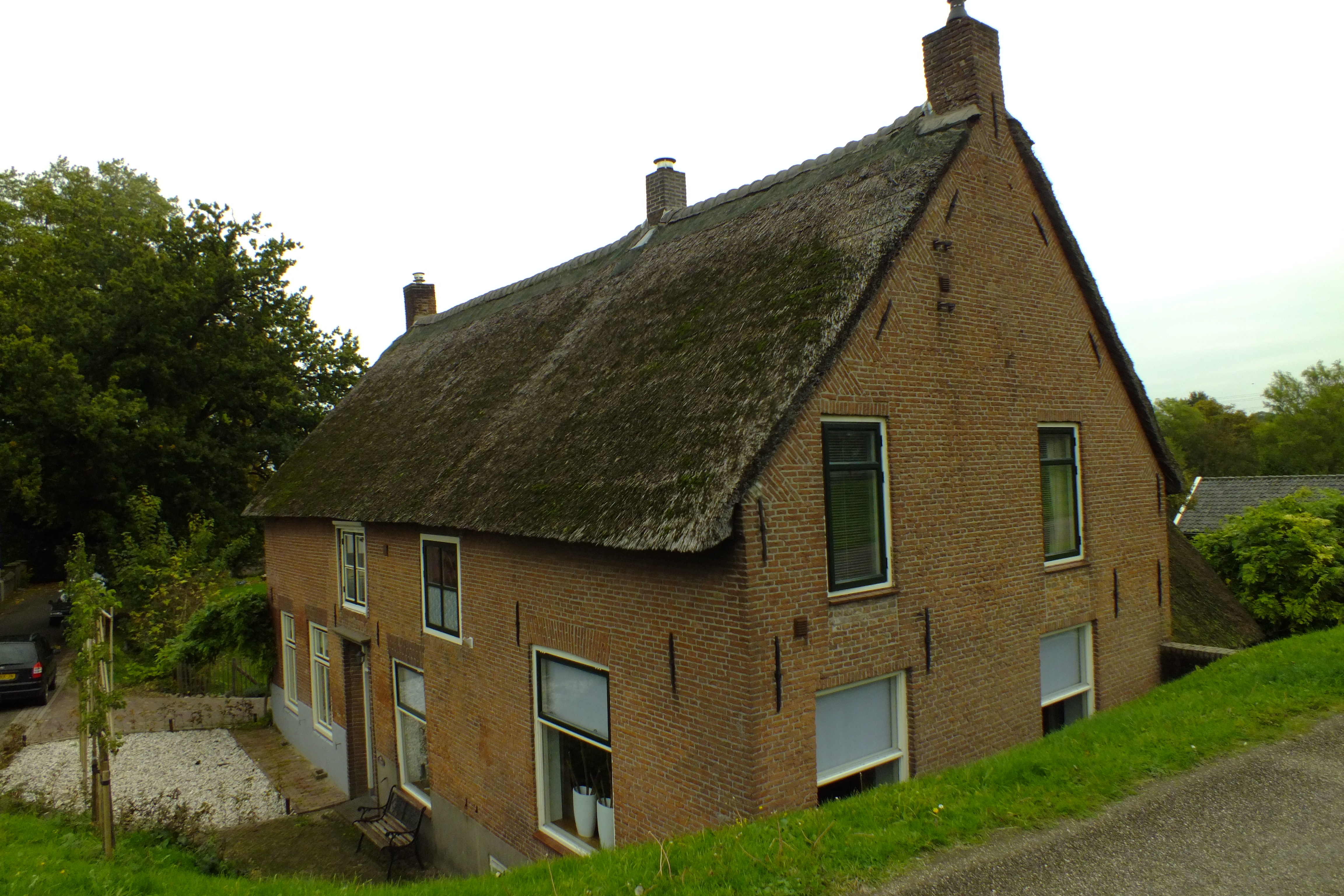 Boerderij Kerkstraat 23 Waardenburg